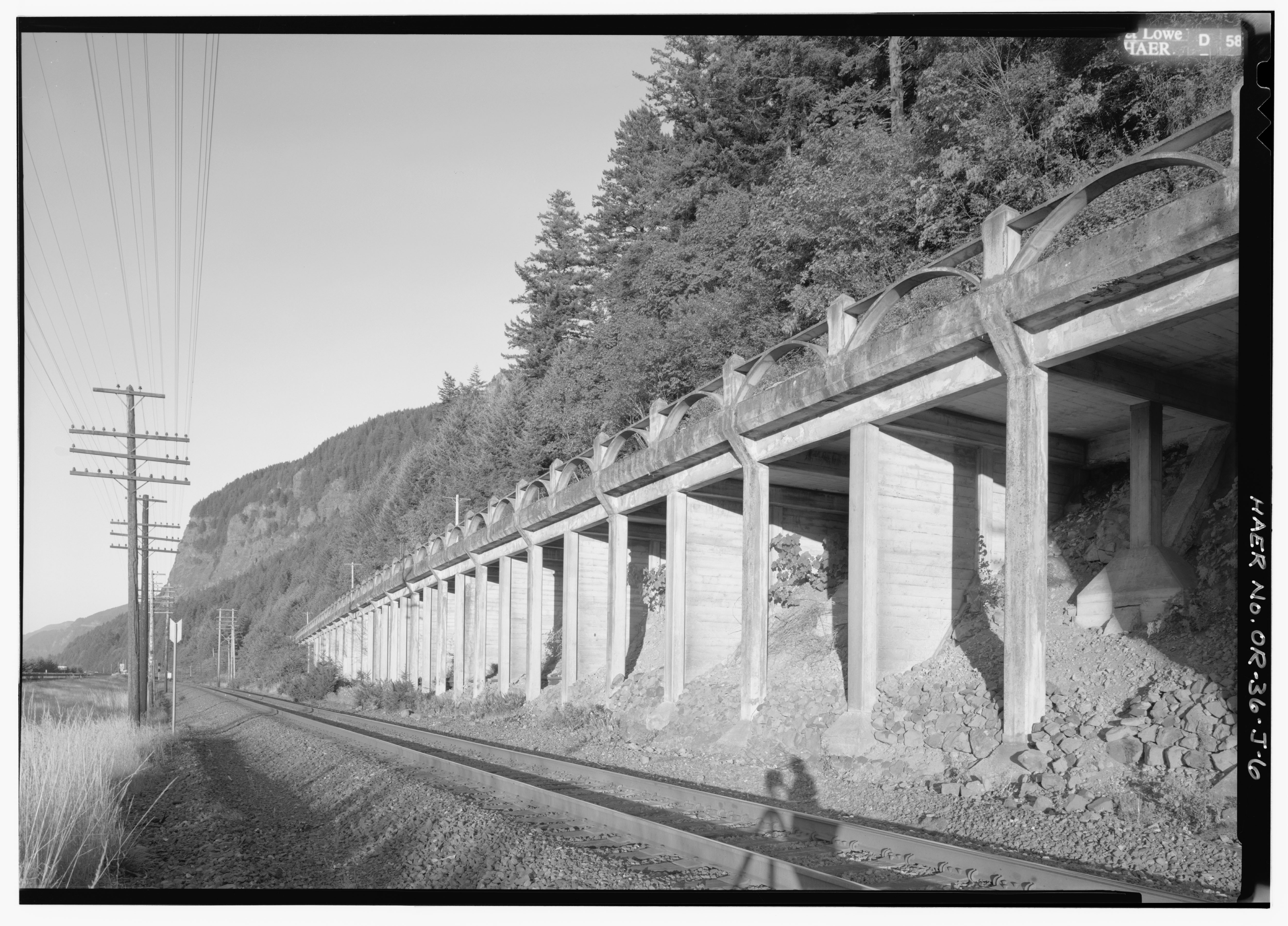 EAST MULTNOMAH FALL[sic] VIADUCT, FOURTH SECTION OF PANORAMIC VIEW, LOOKING EAST-NORTHEAST.